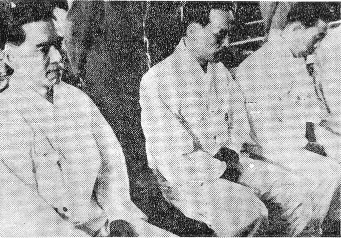 1960년. 419혁명 당시, 발포의 책임으로 법정에 출석한 홍진기, 곽영주, 유충렬 (왼쪽부터)